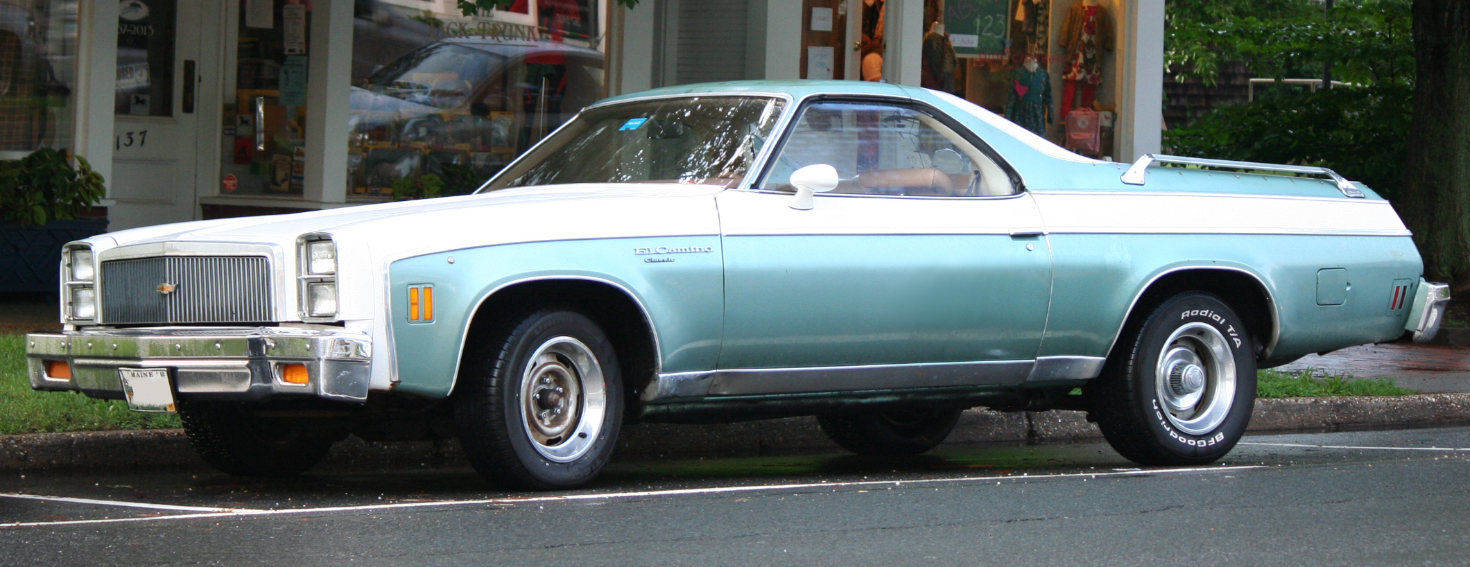 1977 Chevrolet El Camino Classic